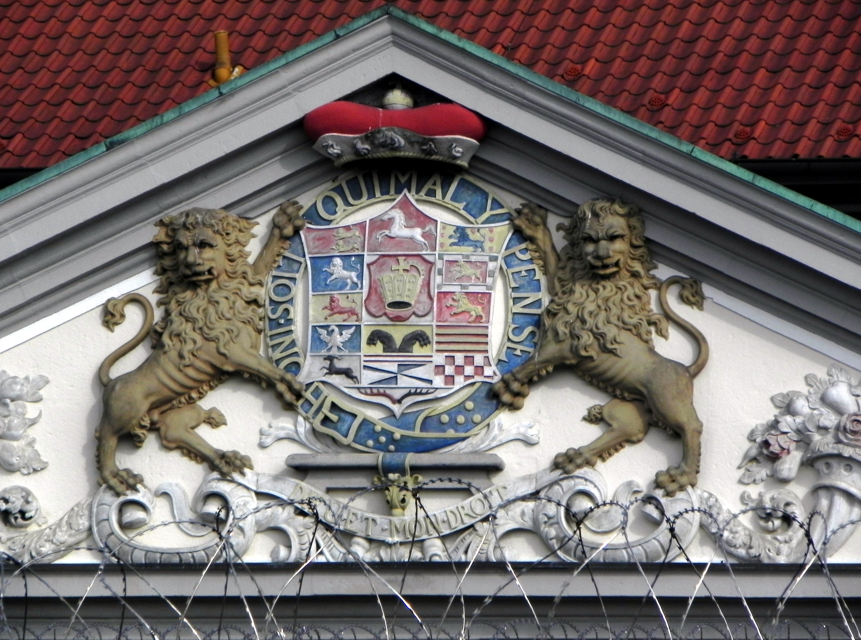 Chur-Hannoversches Wappen im historischen Innenhof der JVA Celle mit dem Spruch des Hosenbandordens „Honi soit qui mal y pense“ (ein Schuft, wer Böses dabei denkt), und dem Wahlspruch der englischen Krone „Dieu et mon droit“ (für Gott und mein Recht).